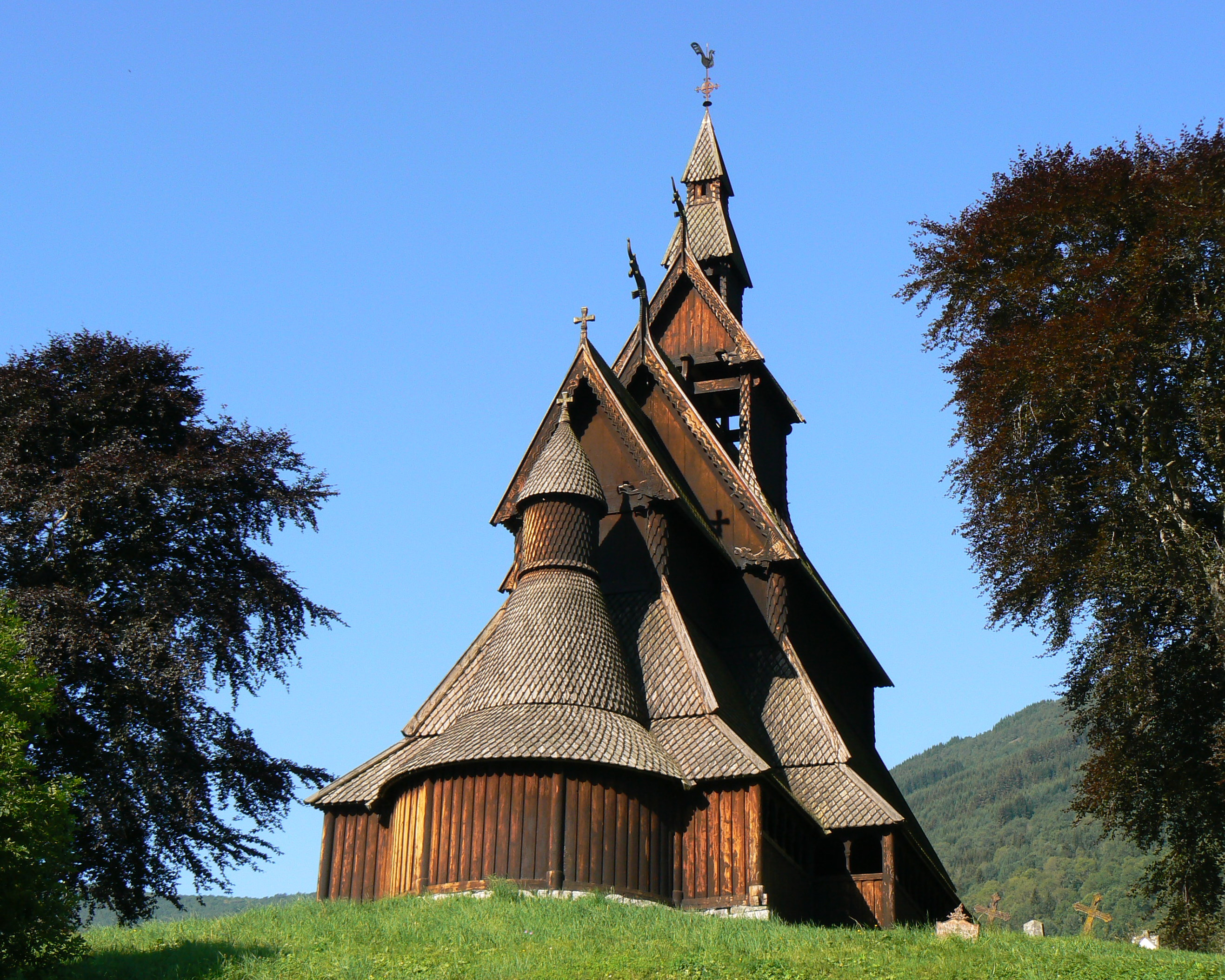 no: Hopperstad stavkyrkje en: Hopperstad stave church